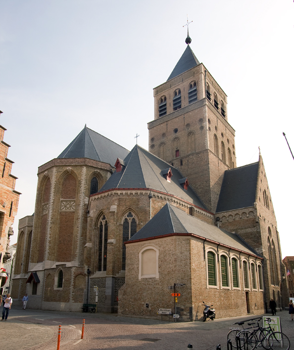 Oostzijde van de Sint-Jakobskerk in Brugge